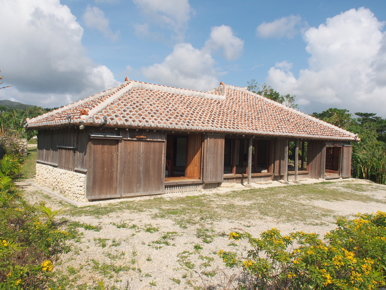 大濱邸（沖縄県石垣市石垣やいま村）